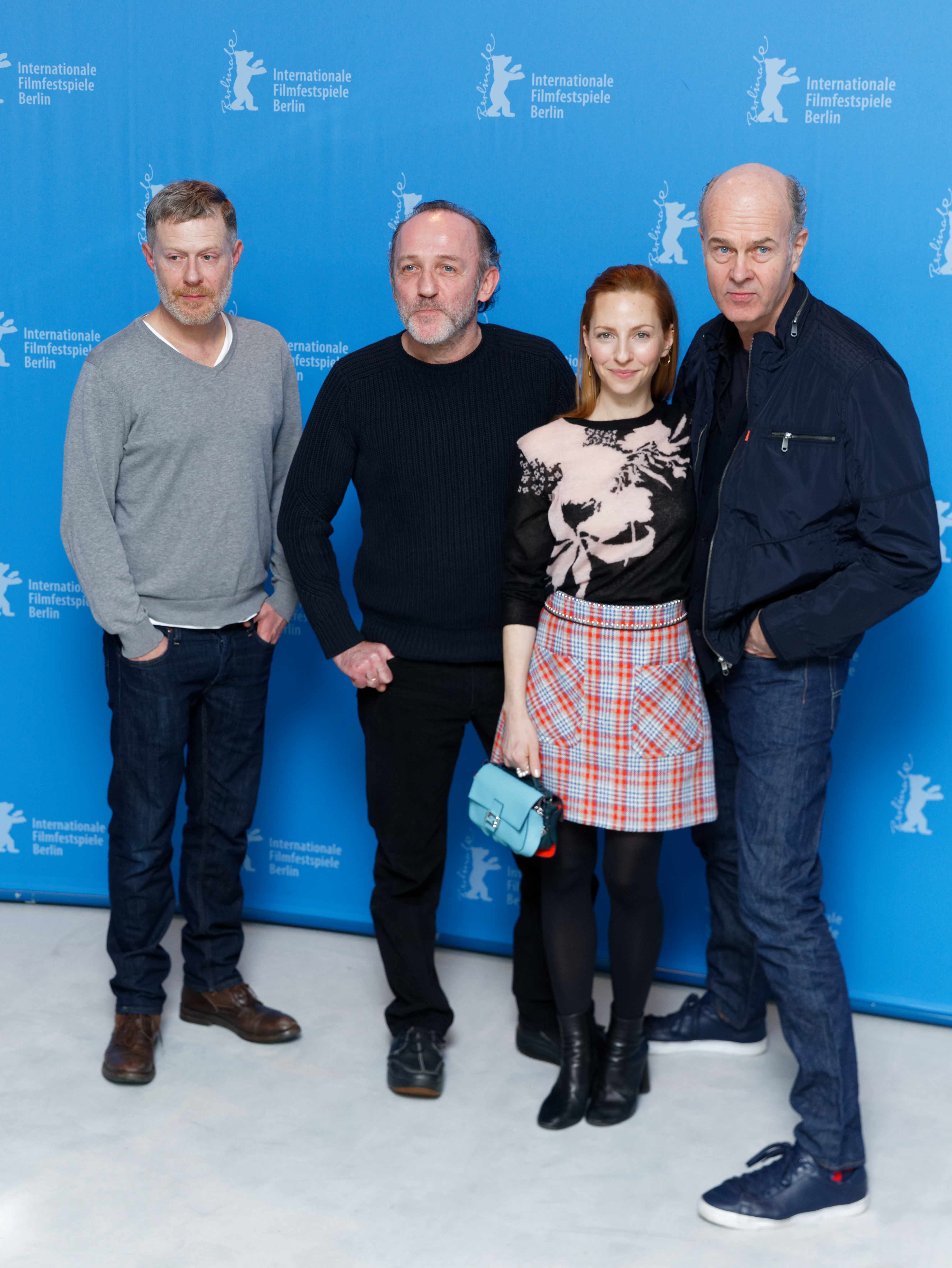 Erik Poppe & Cast beim Photo Call von Kongens Nei (The King's Choice) bei der Berlinale 2017: Andreas Lust (Schauspieler/Actor) Karl Markovics (Schauspieler/Actor) Katharina Schüttler (Schauspielerin/Actress) Erik Poppe (Regisseur/Director)